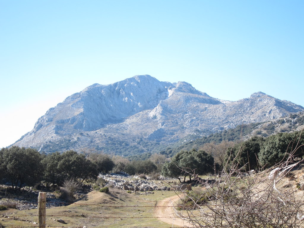 El Chamizo